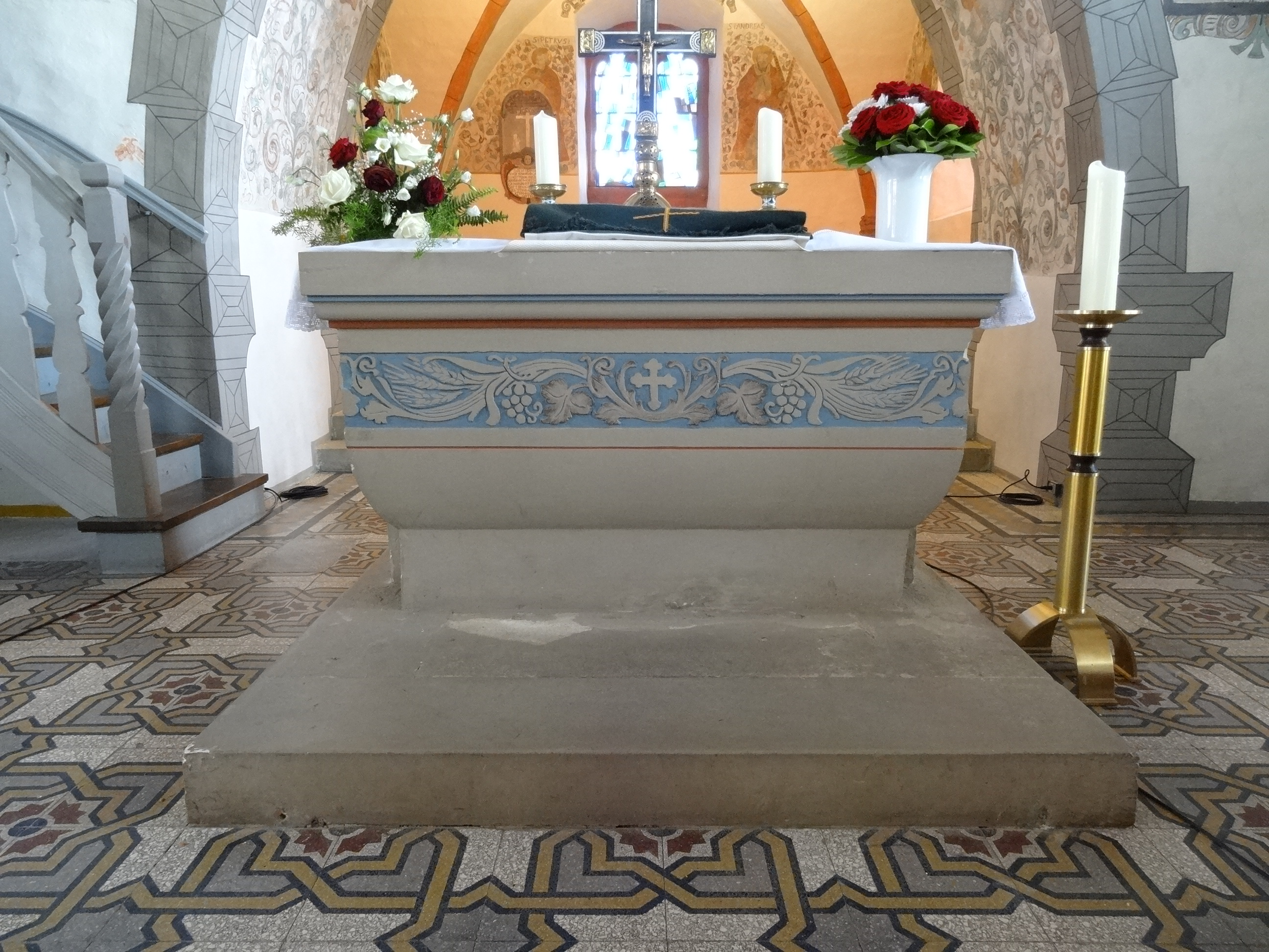 Evangelische Kirche Leihgestern